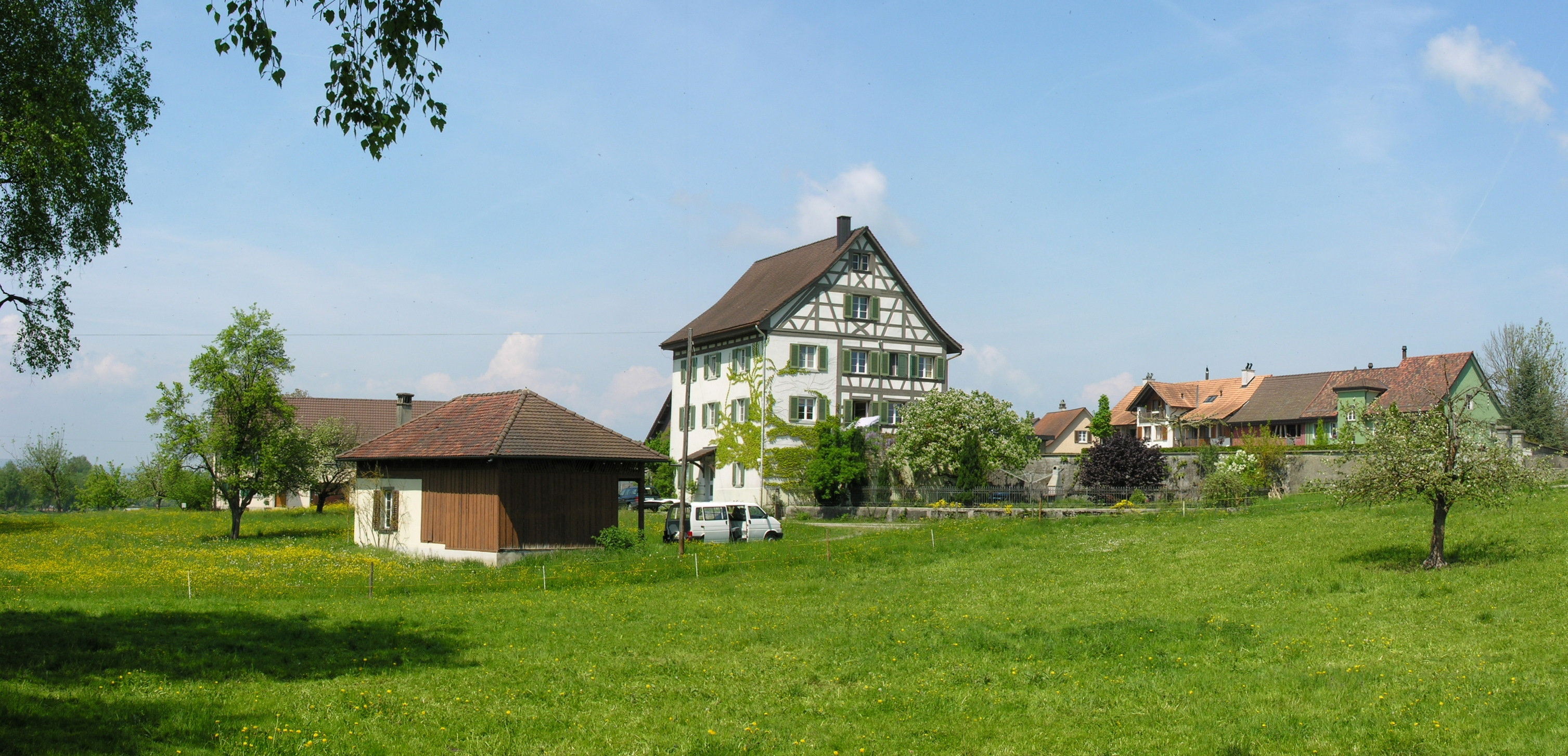 Switzerland, Thurgau, Basadingen